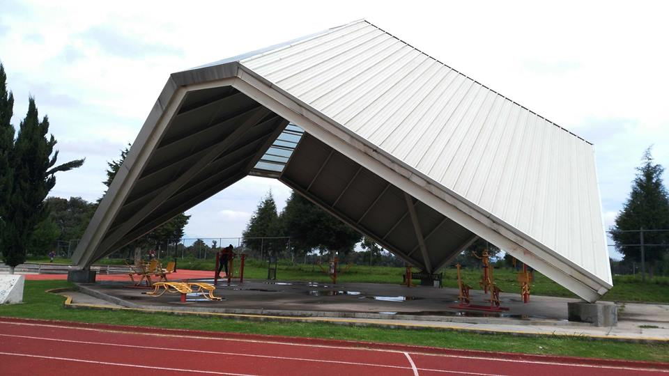 Campos deportivos El Chatlal